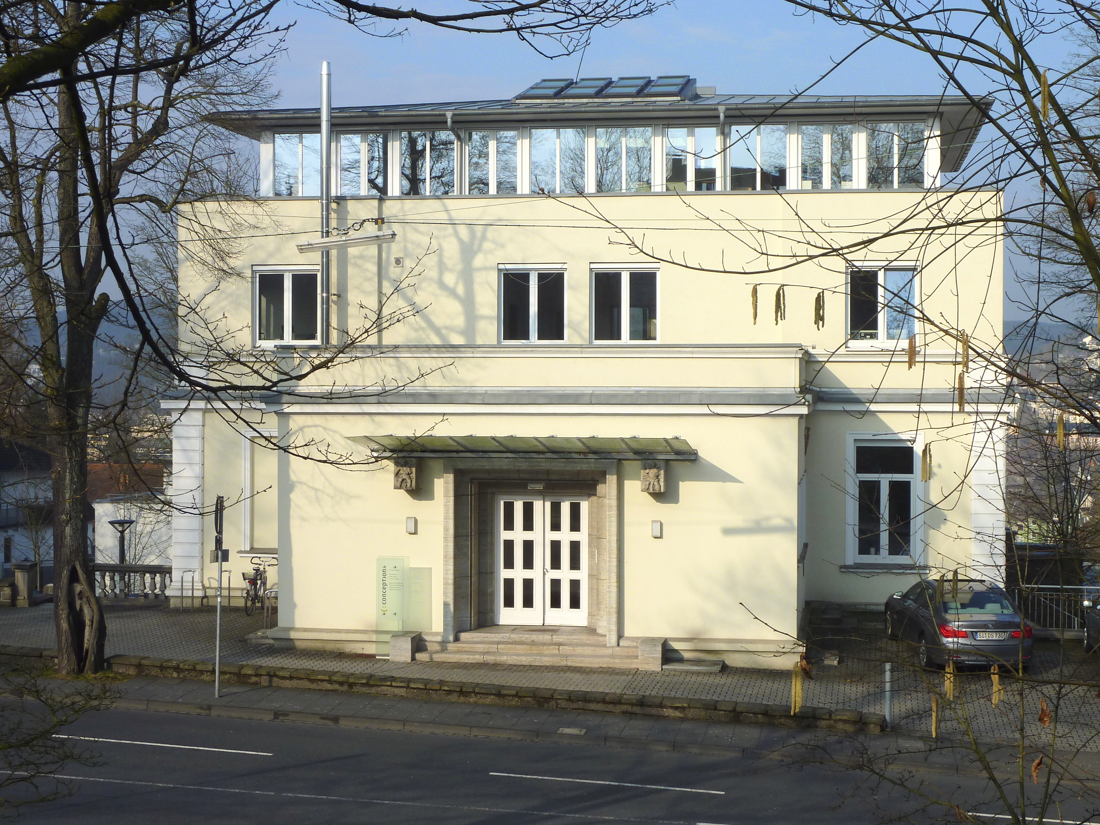 Siegen in Westfalen: vordere Fassade der Villa Waldrich am Fuß des Giersbergs